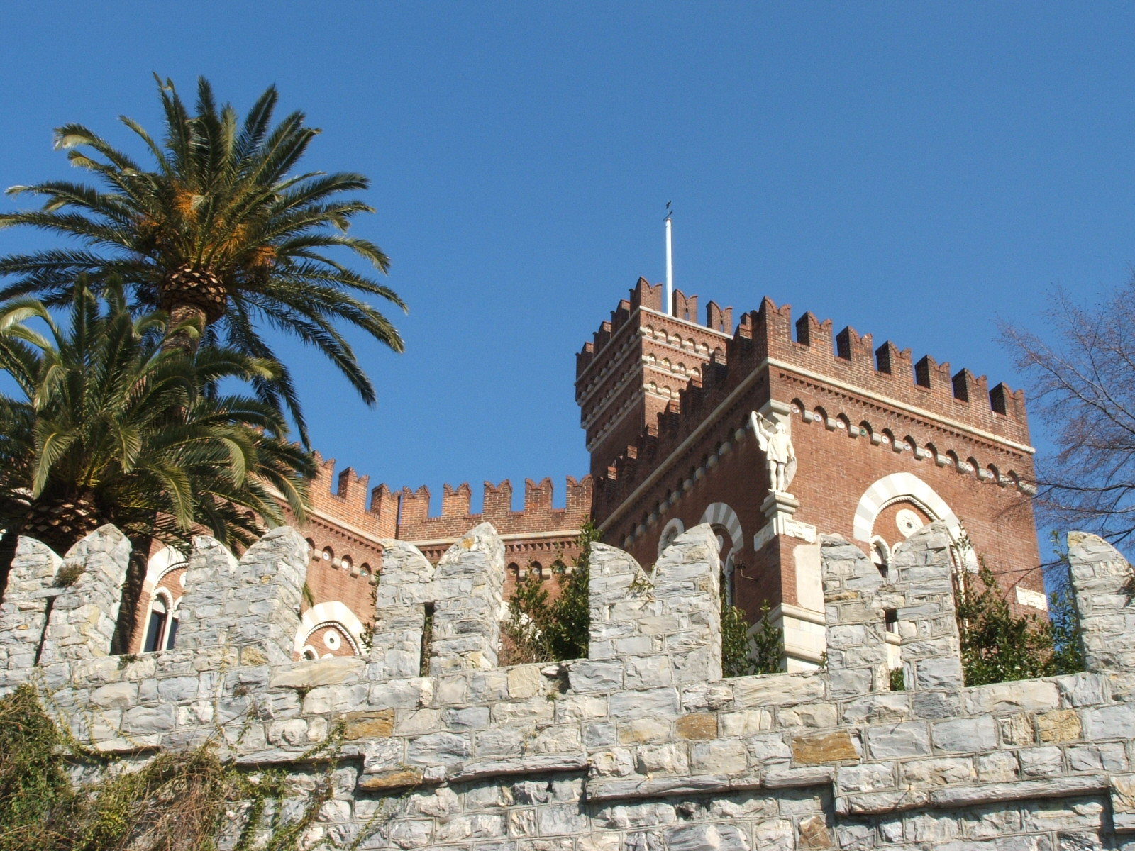 Genova, Castello d'Albertis